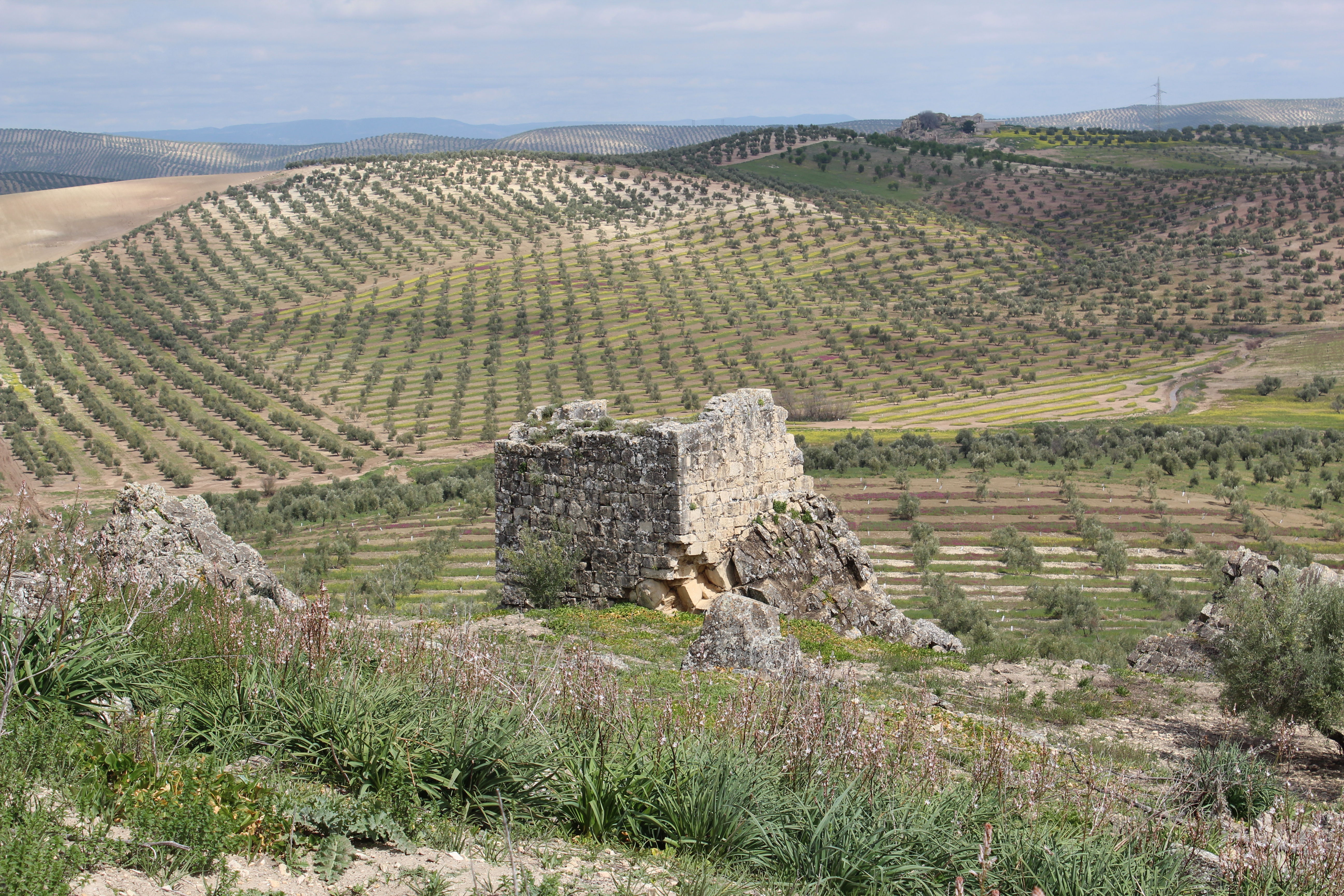 Vista de la Torre del Cortijo de los Salineros desde el sur.